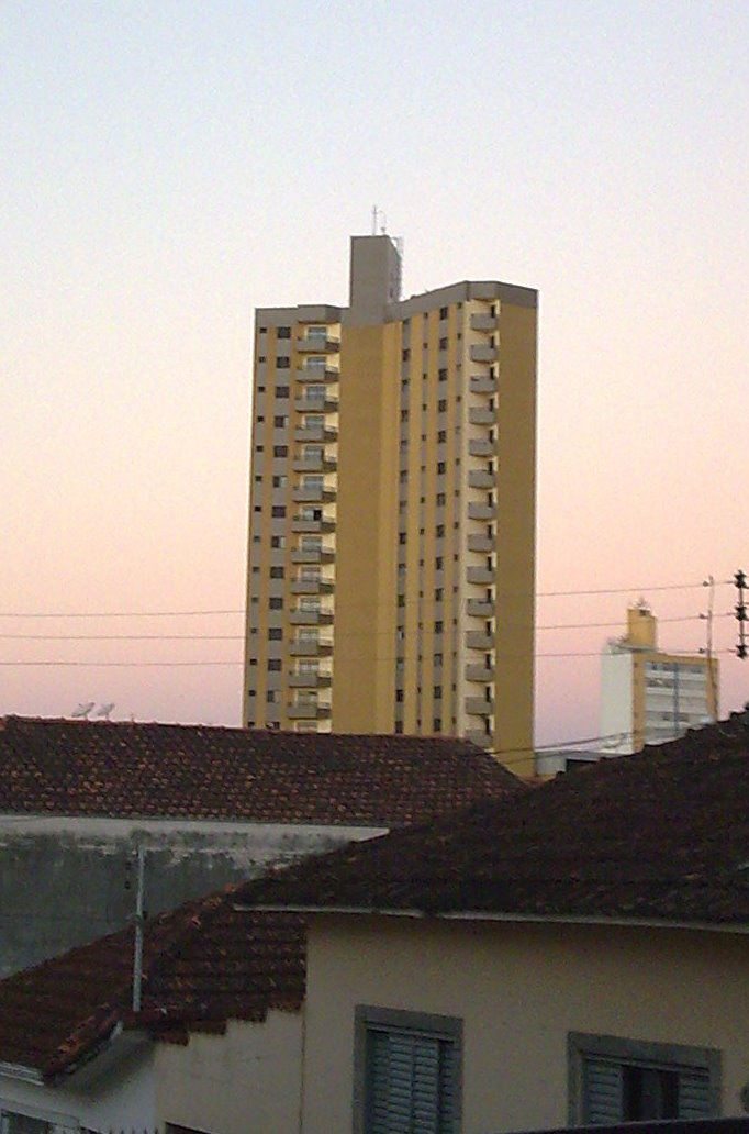 O maior edifício de Pouso Alegre/MG, o Edifício Monte Carlo foi concluído em 2004.